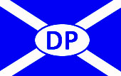 Эмблема Сейшельской Демократической Партии